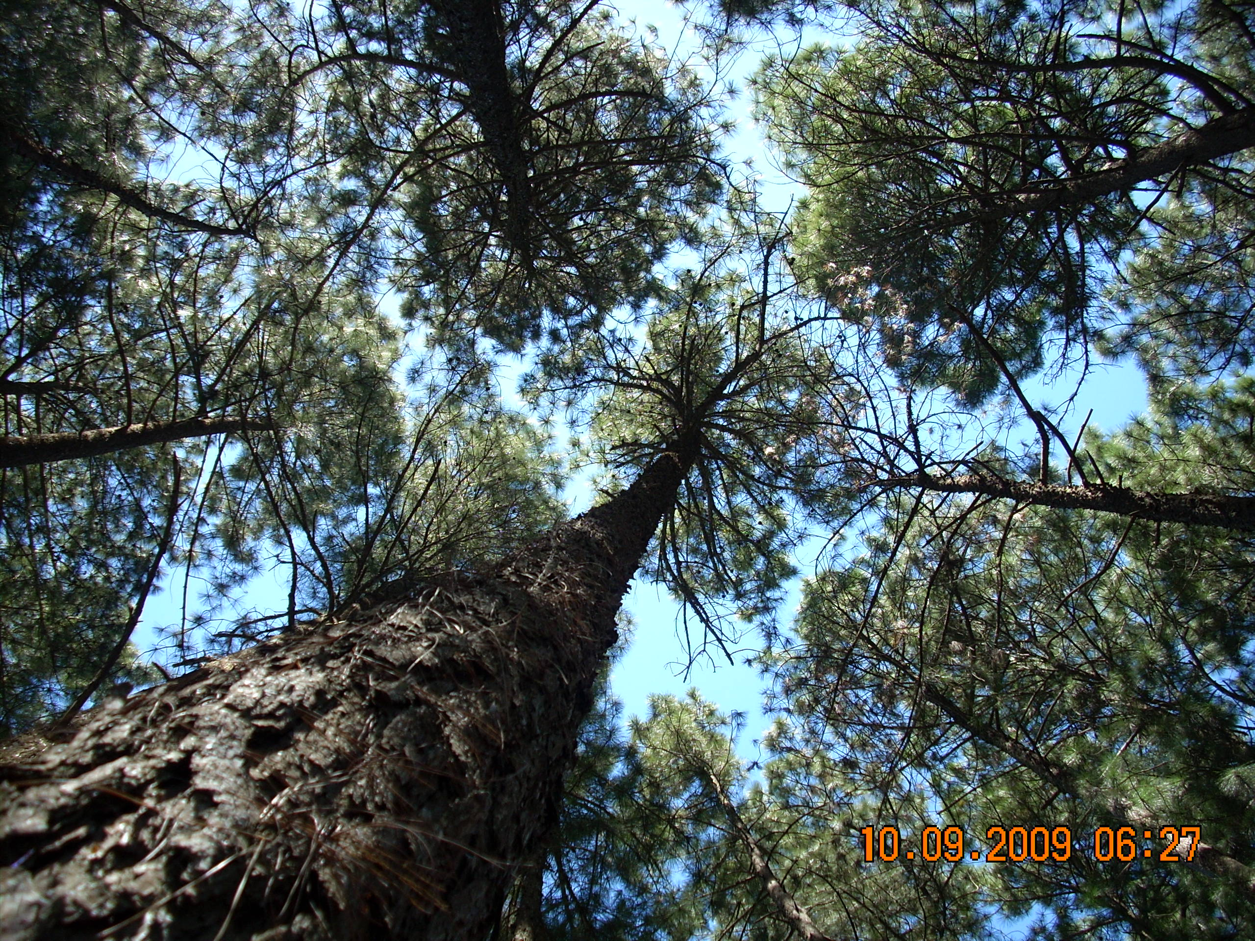 Macarao National Park